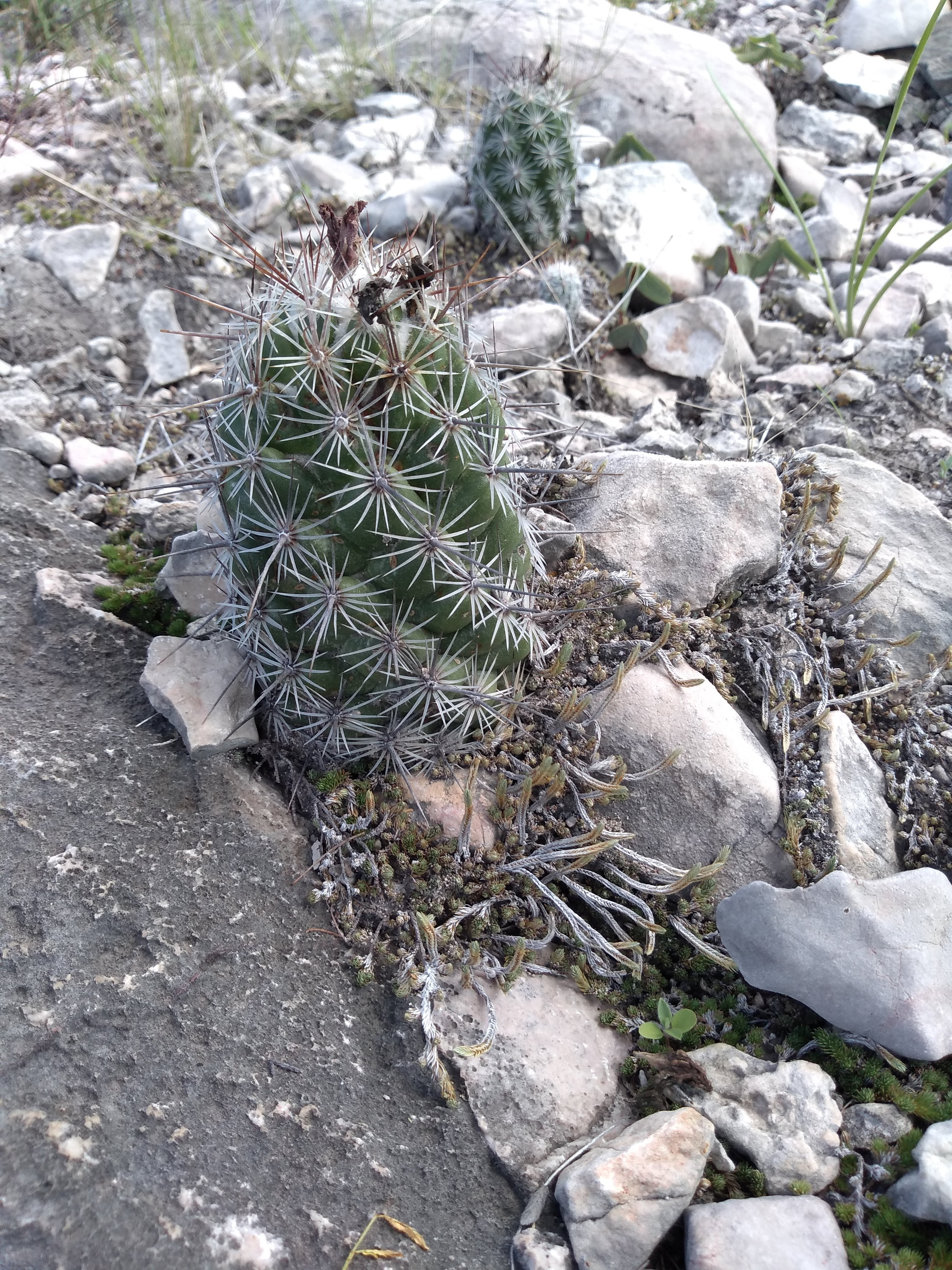 Individuos de Neolloydia conoidea en campo